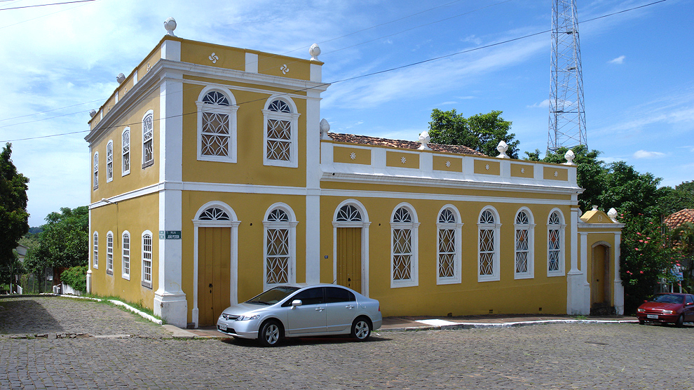 Secreatria Municipal do Trabalho e Ação Social de Triunfo, Rio Grande do Sul, Brasil, antiga residência de Antônio Ferreira Canabarro, século XIX.